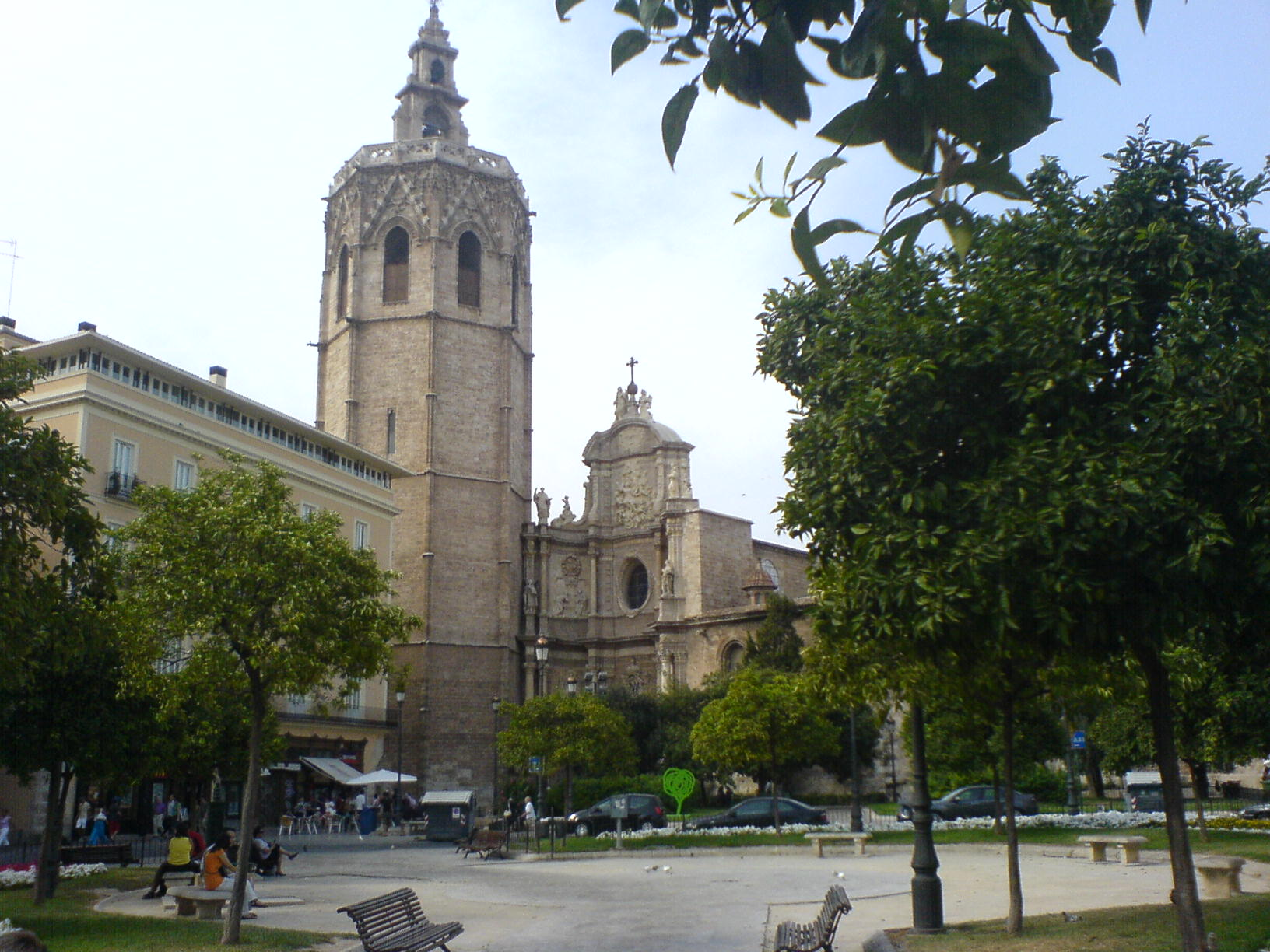 Catedral de Valencia desde la Plaza de la Reina